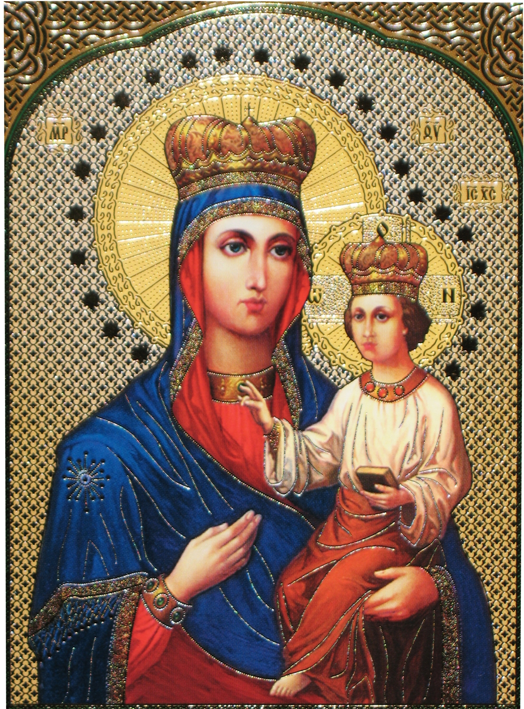 Озерянская икона Божией Матери. Вариант 19 века (не оригинал). Писан по иконе, находящейся в Благовещенском кафедральном соборе Харькова.